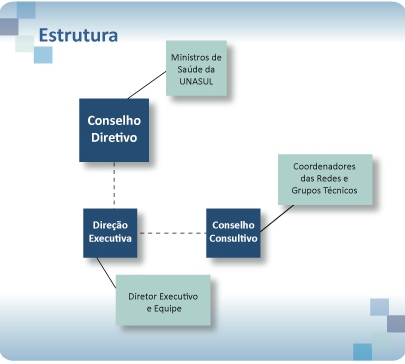 Organograma do Isags